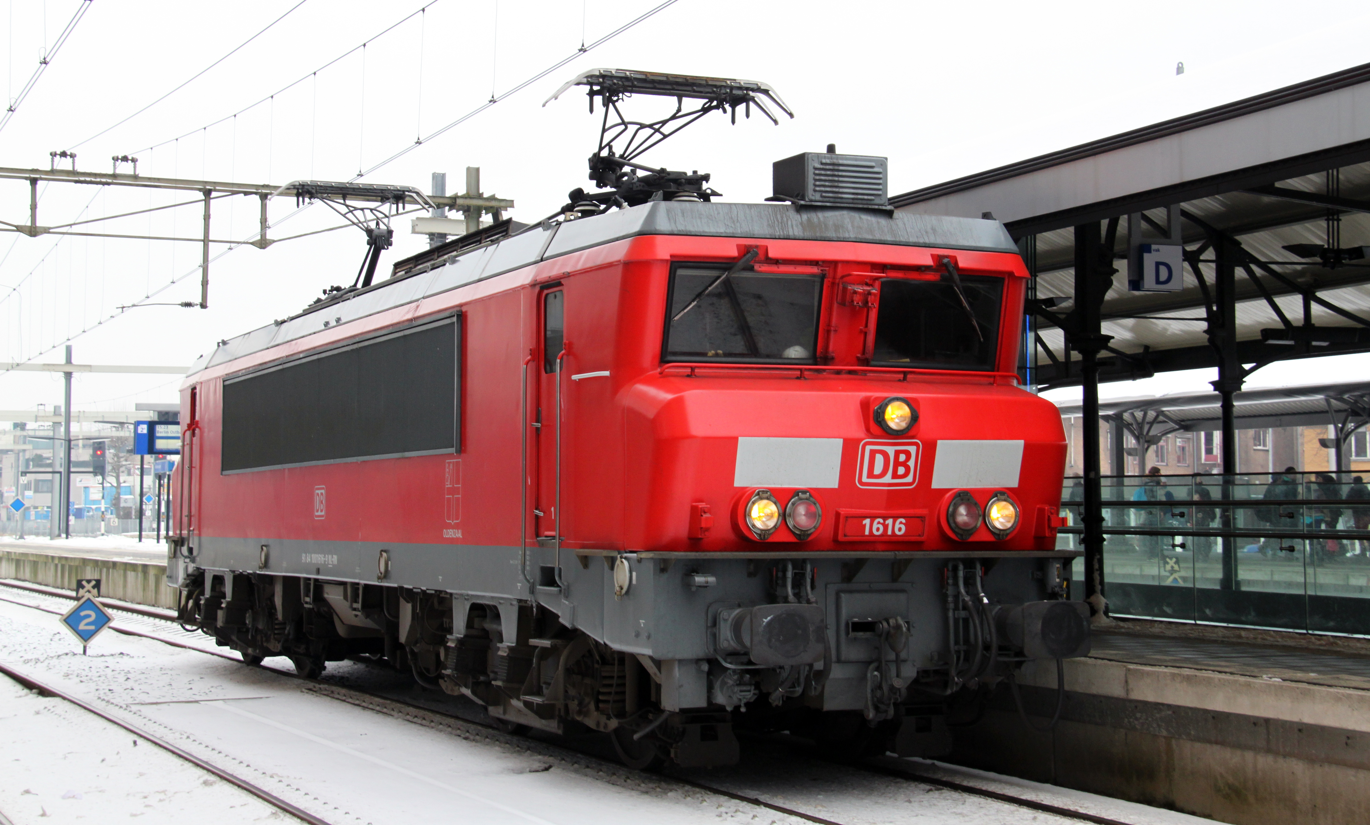 DB Schenker 1616 in het station van Hilversum.